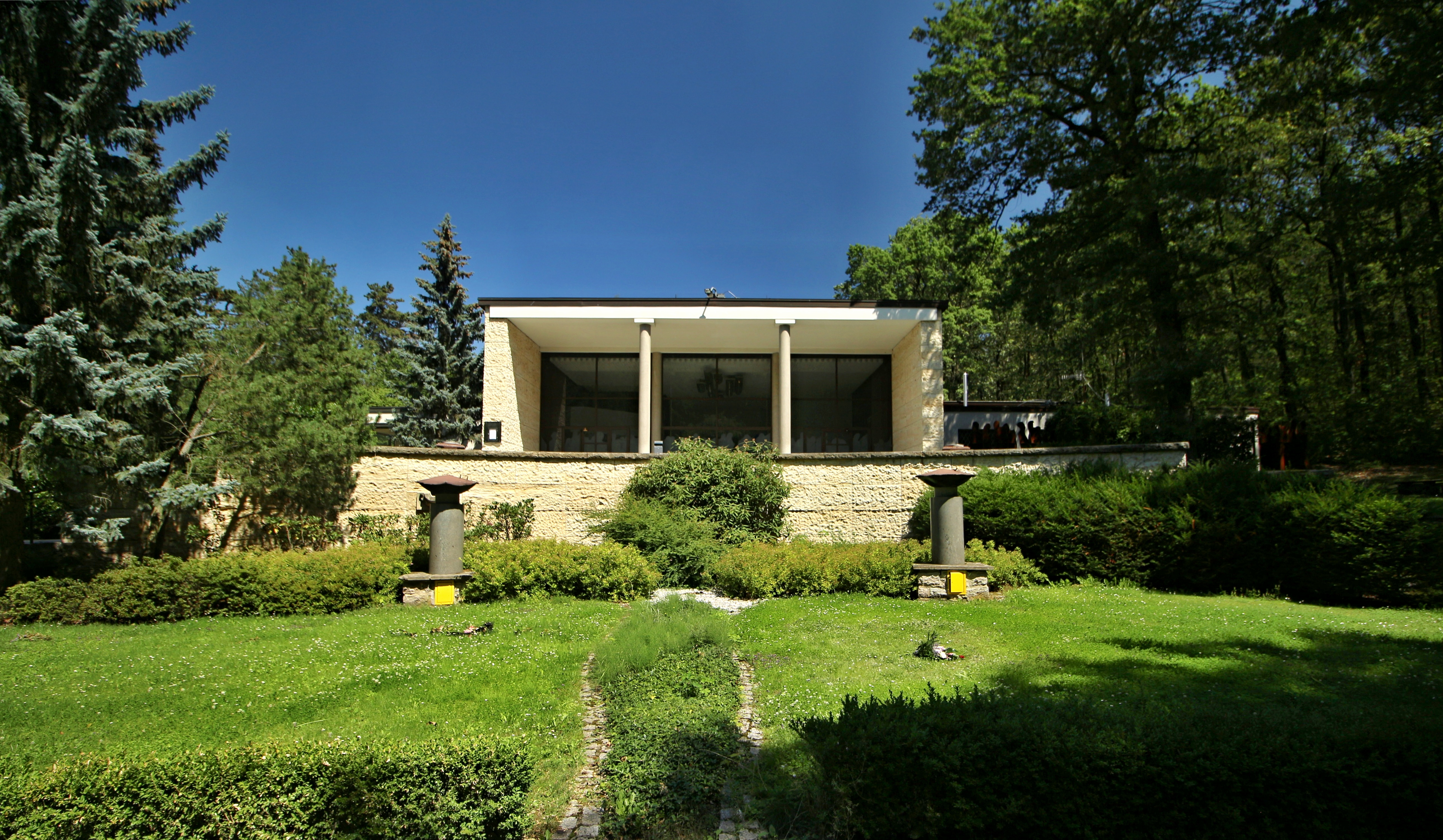 Hřbitov Praha-Motol